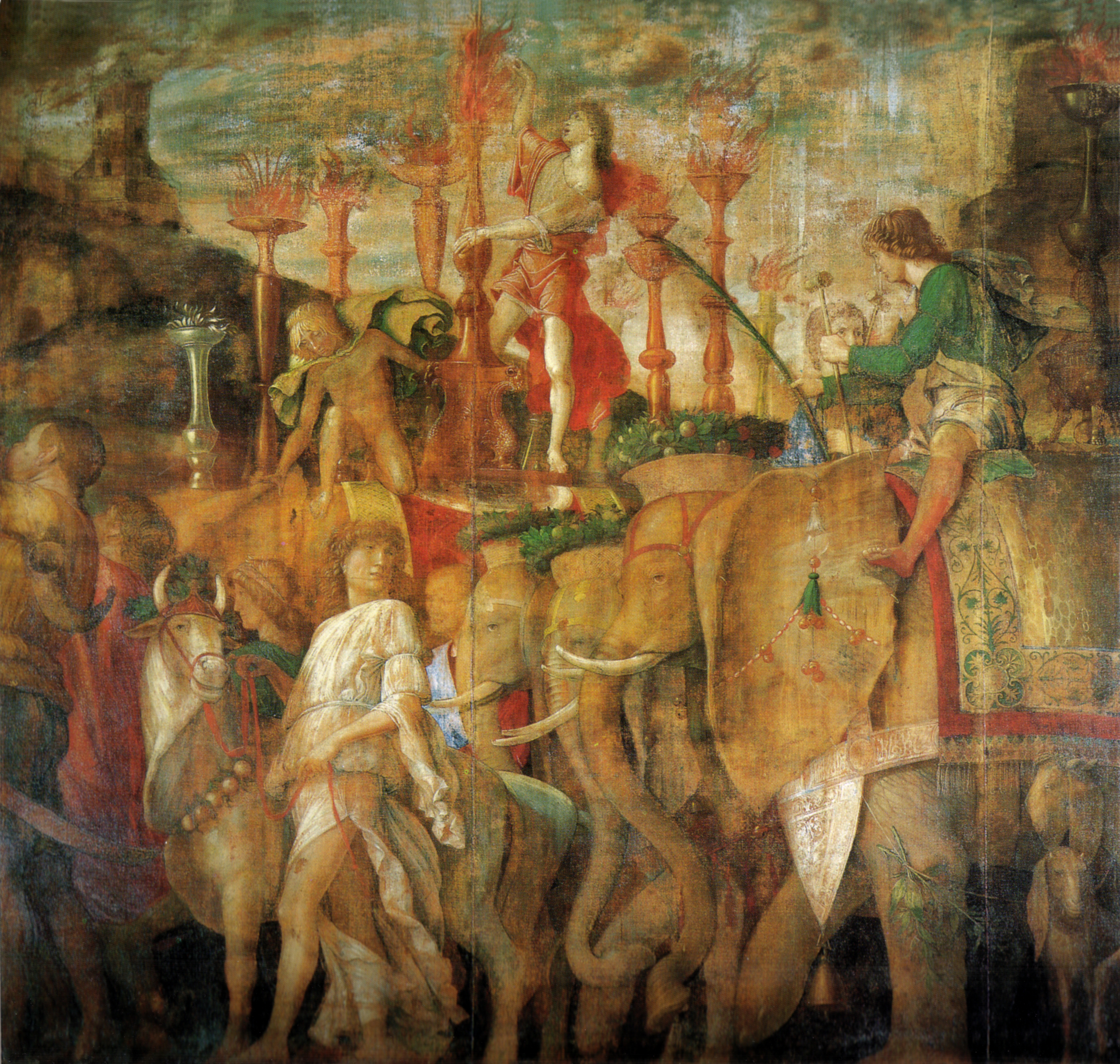 detail